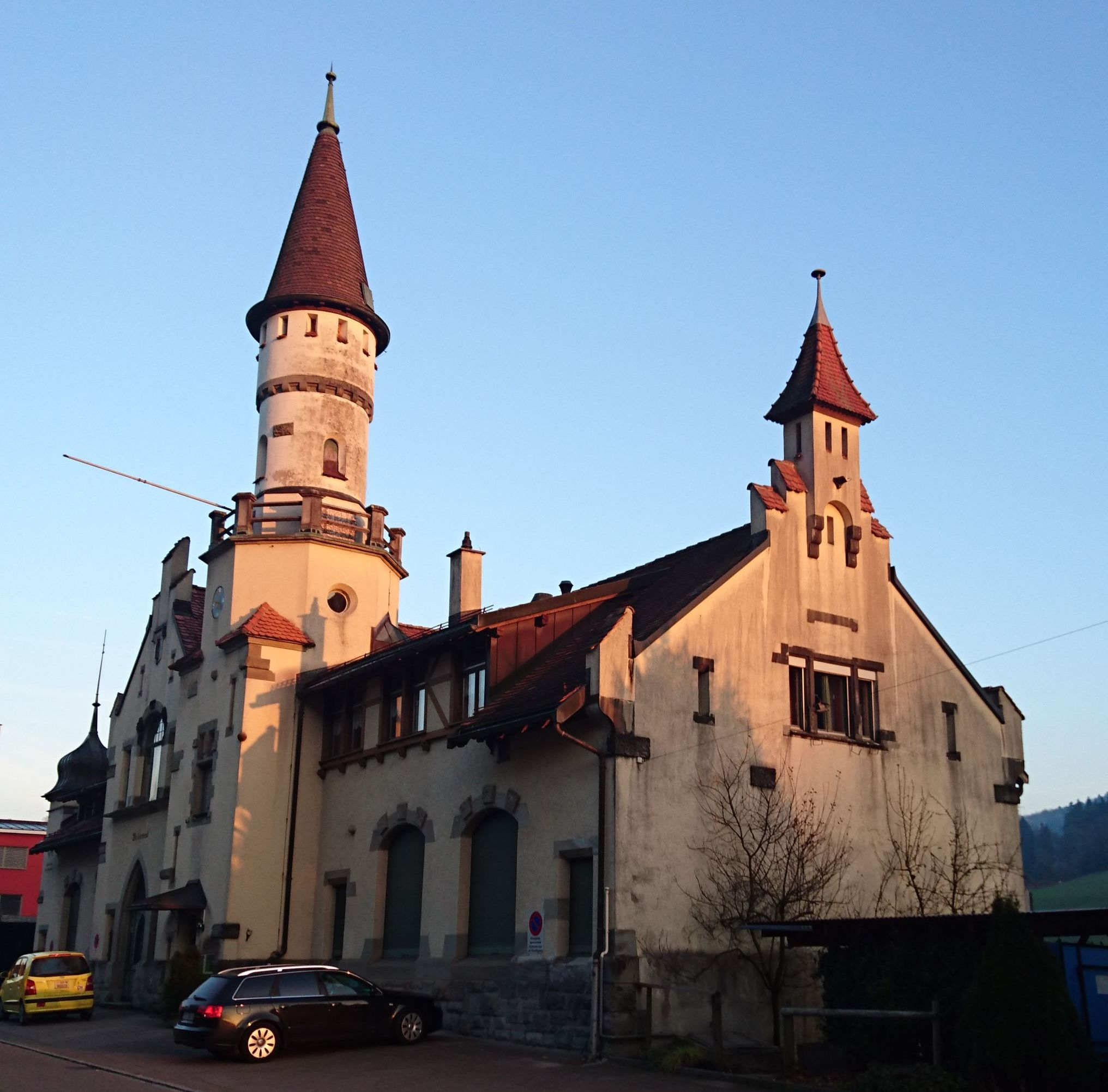 Das im Heimatstil errichtete Schützenhaus der Feldschützengesellschaft St. Gallen aus dem Jahr 1904